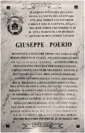 Posta nel Municipio di Belcastro nel 2007